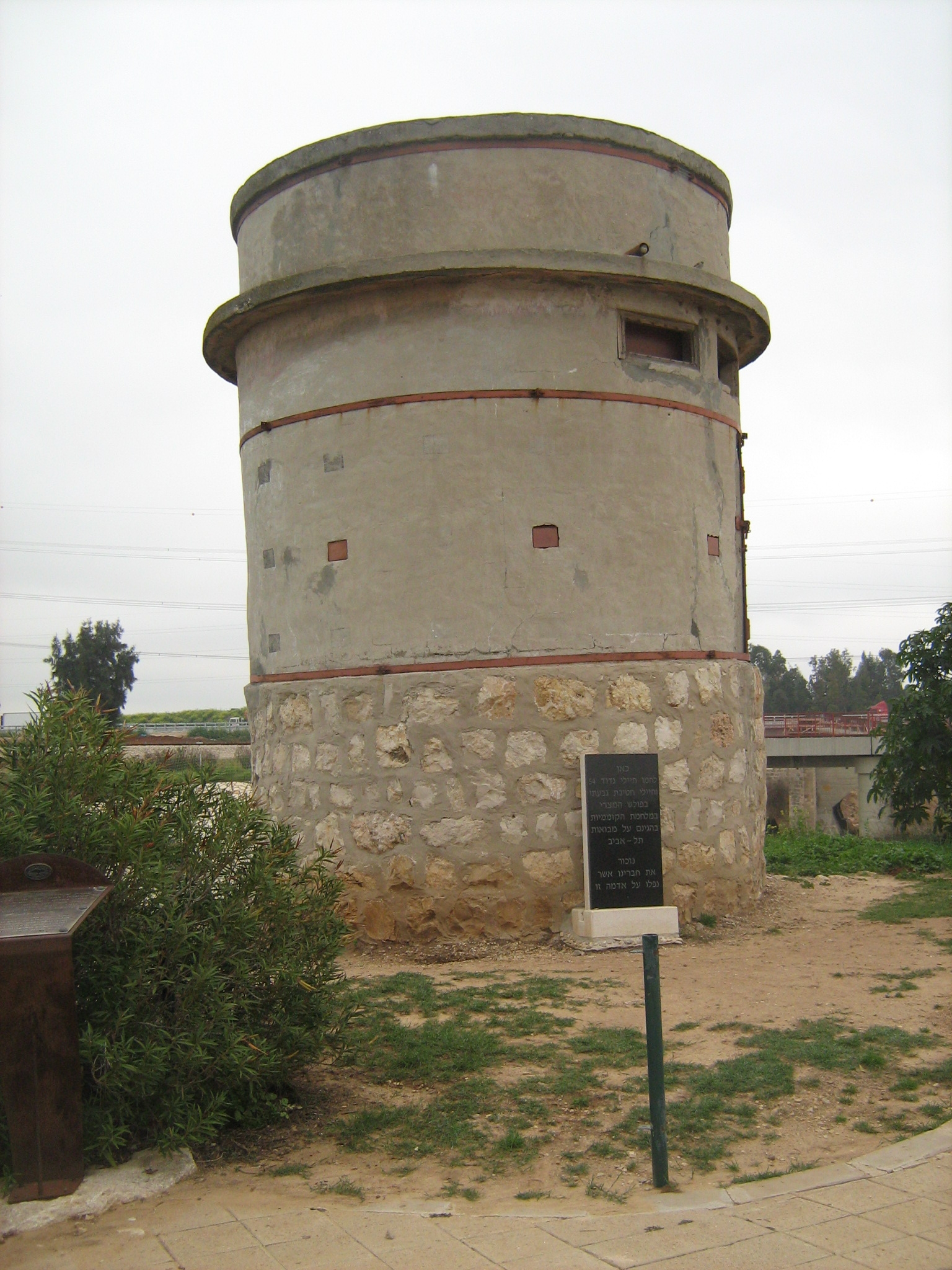 פארק עד הלום